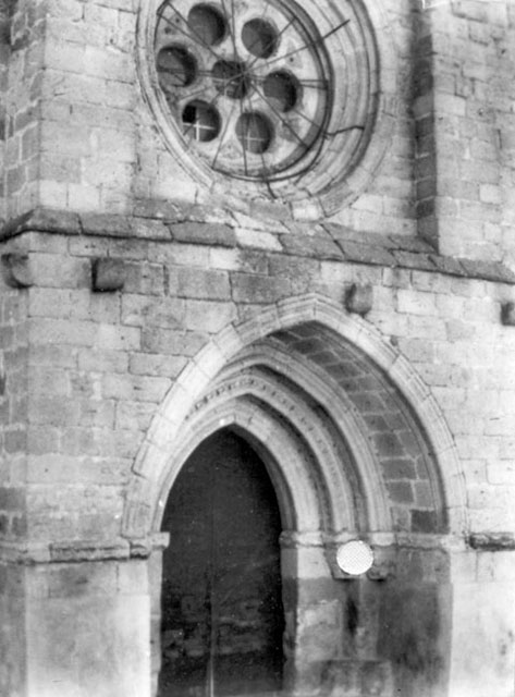 Iglesia parroquial de Santa María - Castronuño (Valladolid) - Cuaderno. Álbum de Valladolid - Fotografía 42 x 60 B/N